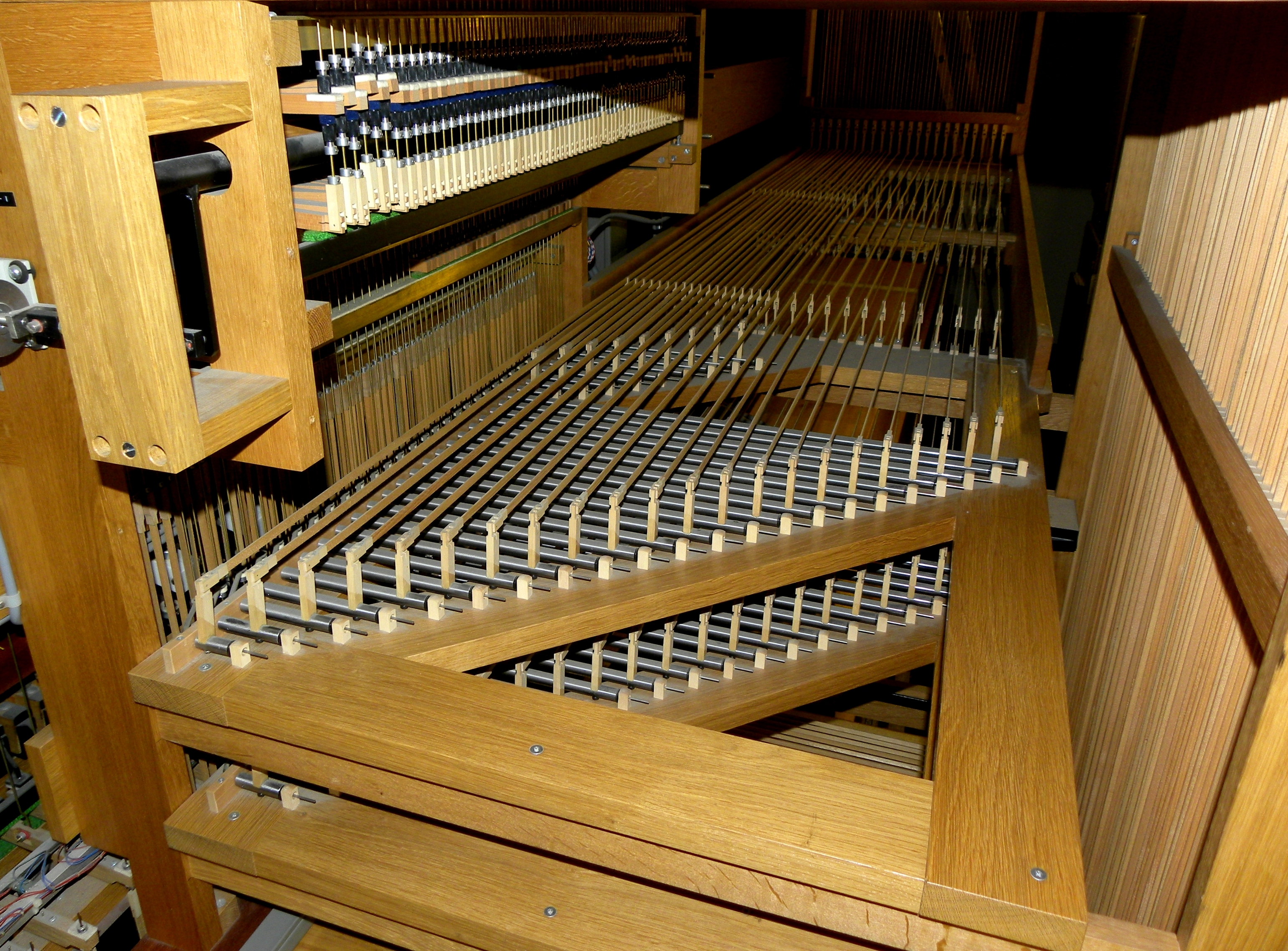 Mechaniczna traktura gry - mechanizm wałkowy z abstraktami